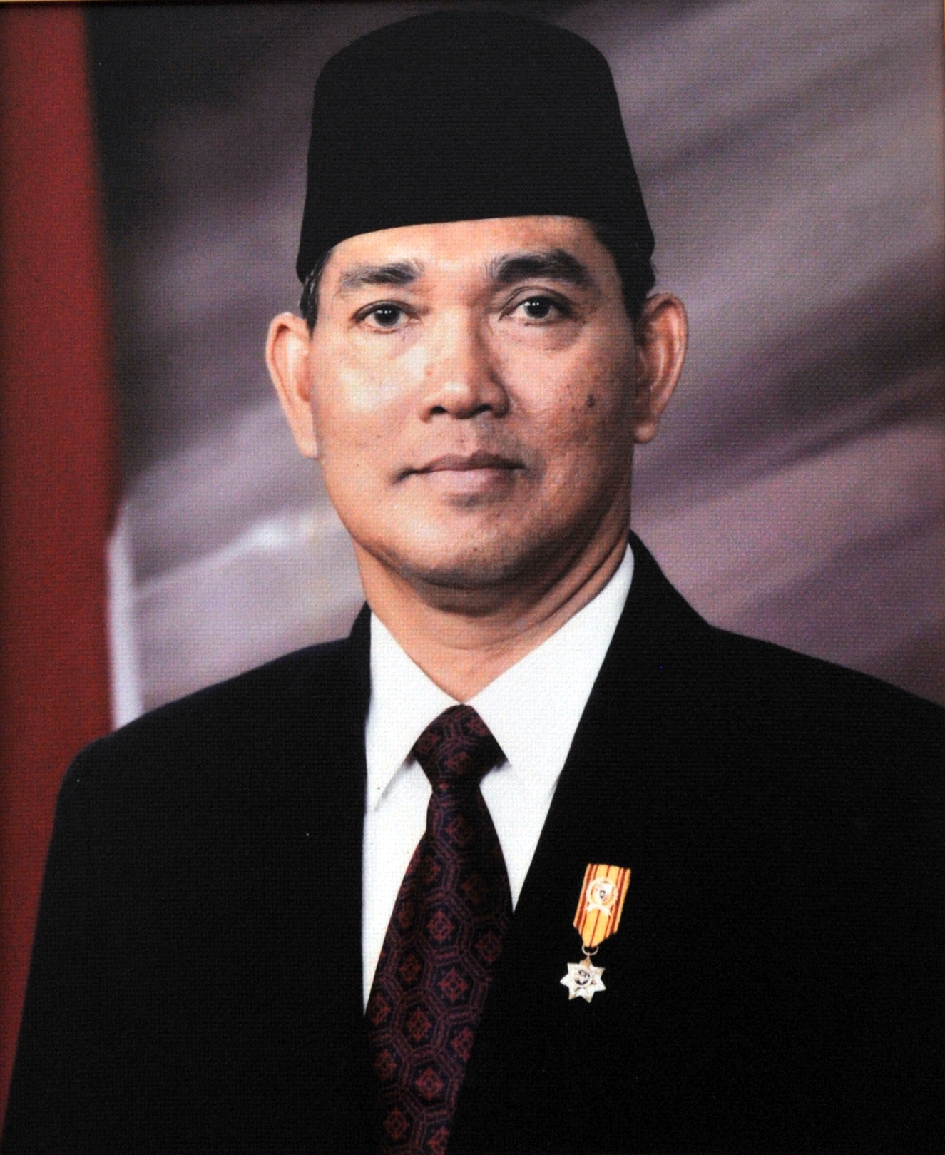 Foto Resmi Try Sutrisno